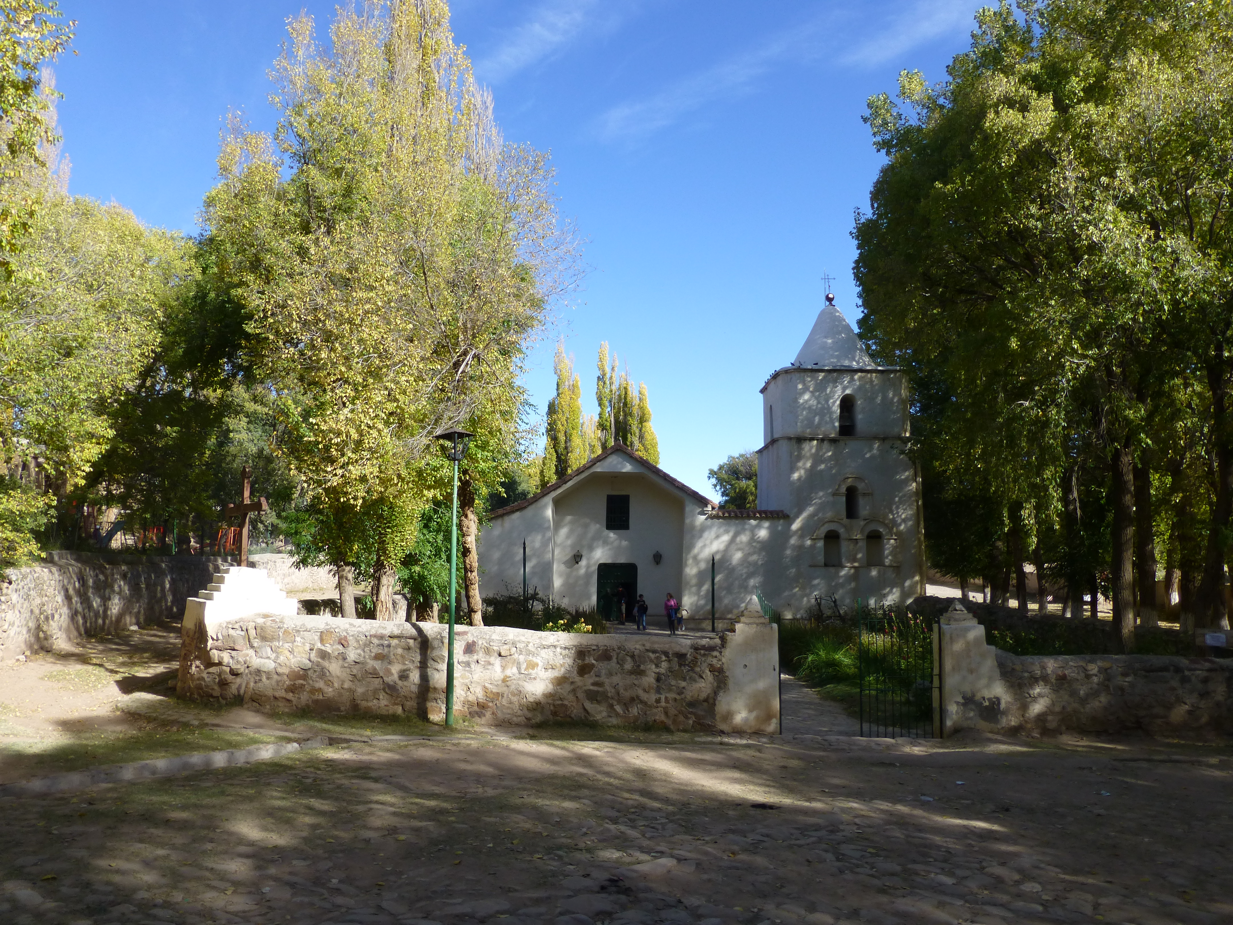 Capilla de Yavi